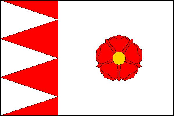 Česky: vlajka obce Senička